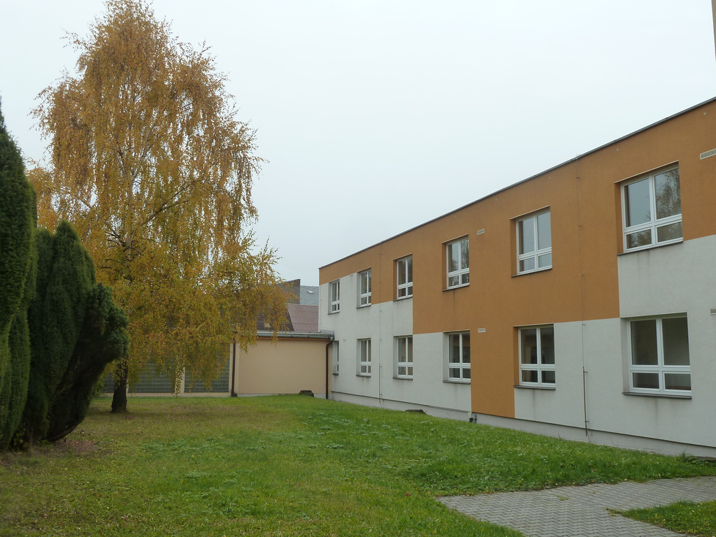 Studenthejmo de Ekonomia mezlernejo en Svitavy, kie parte okazis Esperanta Vikimanio (26.-30.10.2011) - tranoktejo kaj okazlokoj de pluraj programeroj (vesperaj prelegoj, trejnado de komencantoj, sabataj prelegoj)